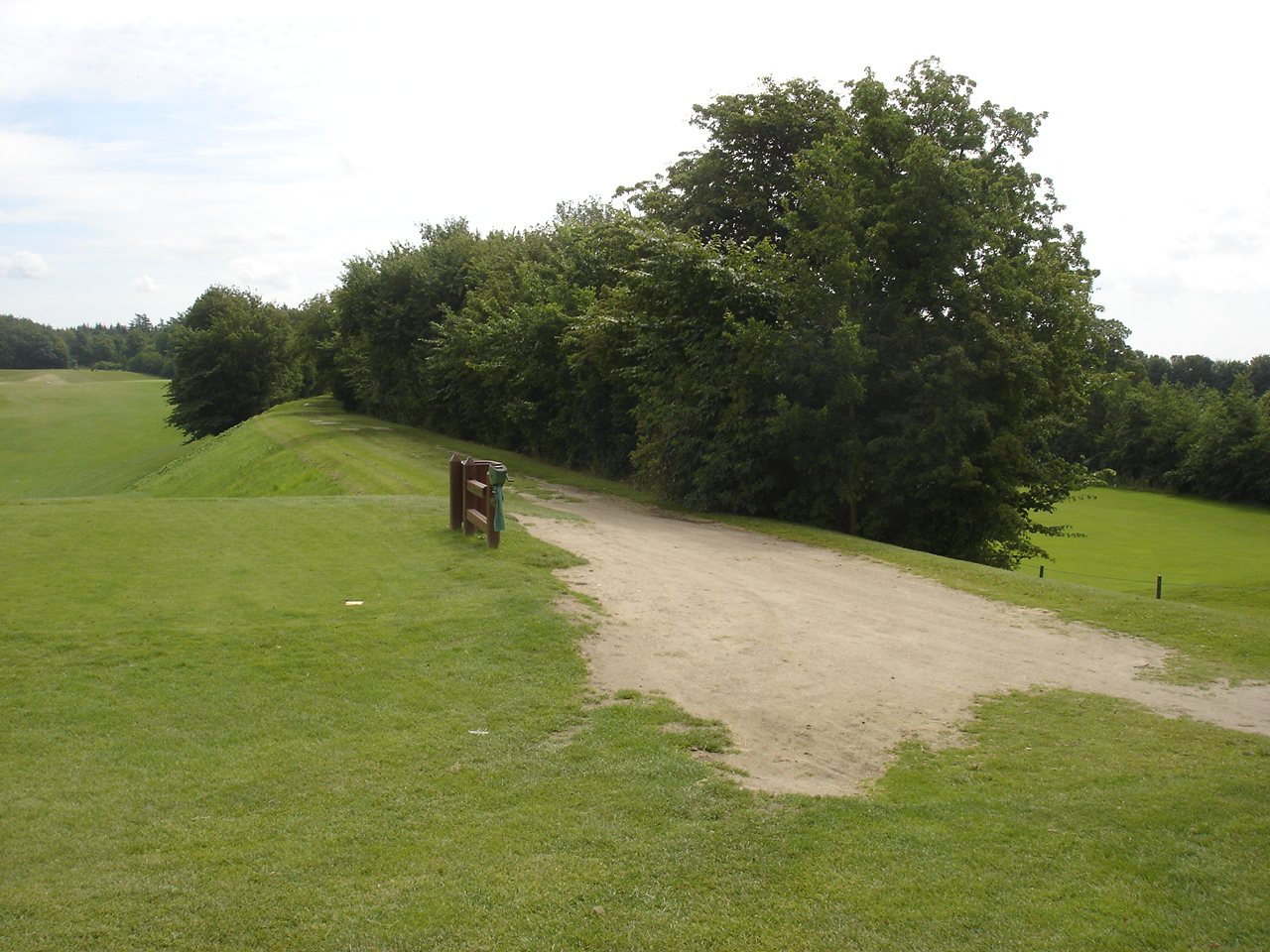 Kig tilbage på Ringsted-Hvalsø-Frederikssund-banens tracé langs hul 2 på Skjoldenæsholm Golfbanes Old Course